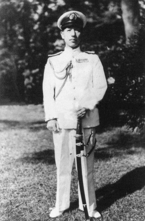 大佐時代の前田。